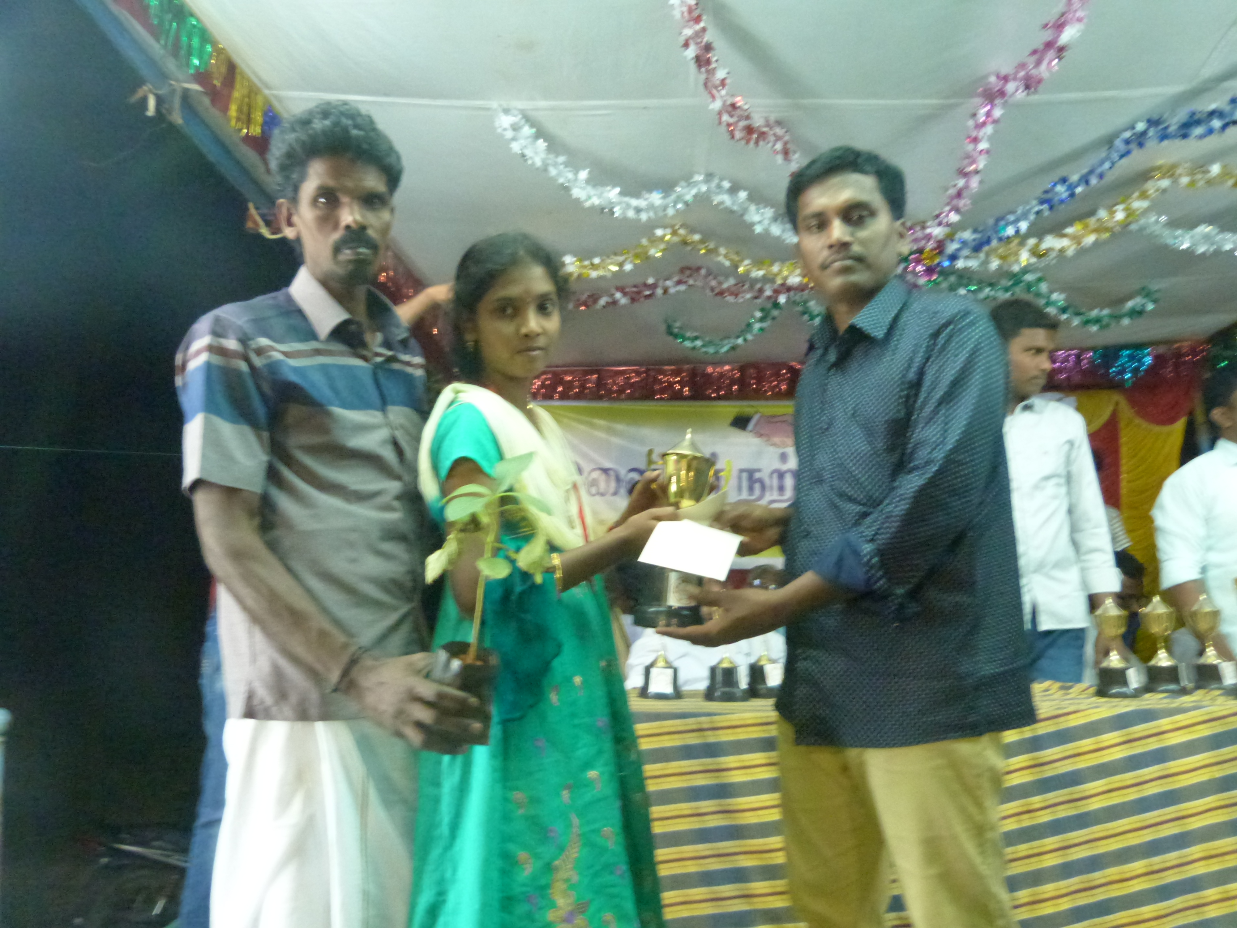 முடச்சிக்காடு இளைஞர் நற்பணி மன்றம்